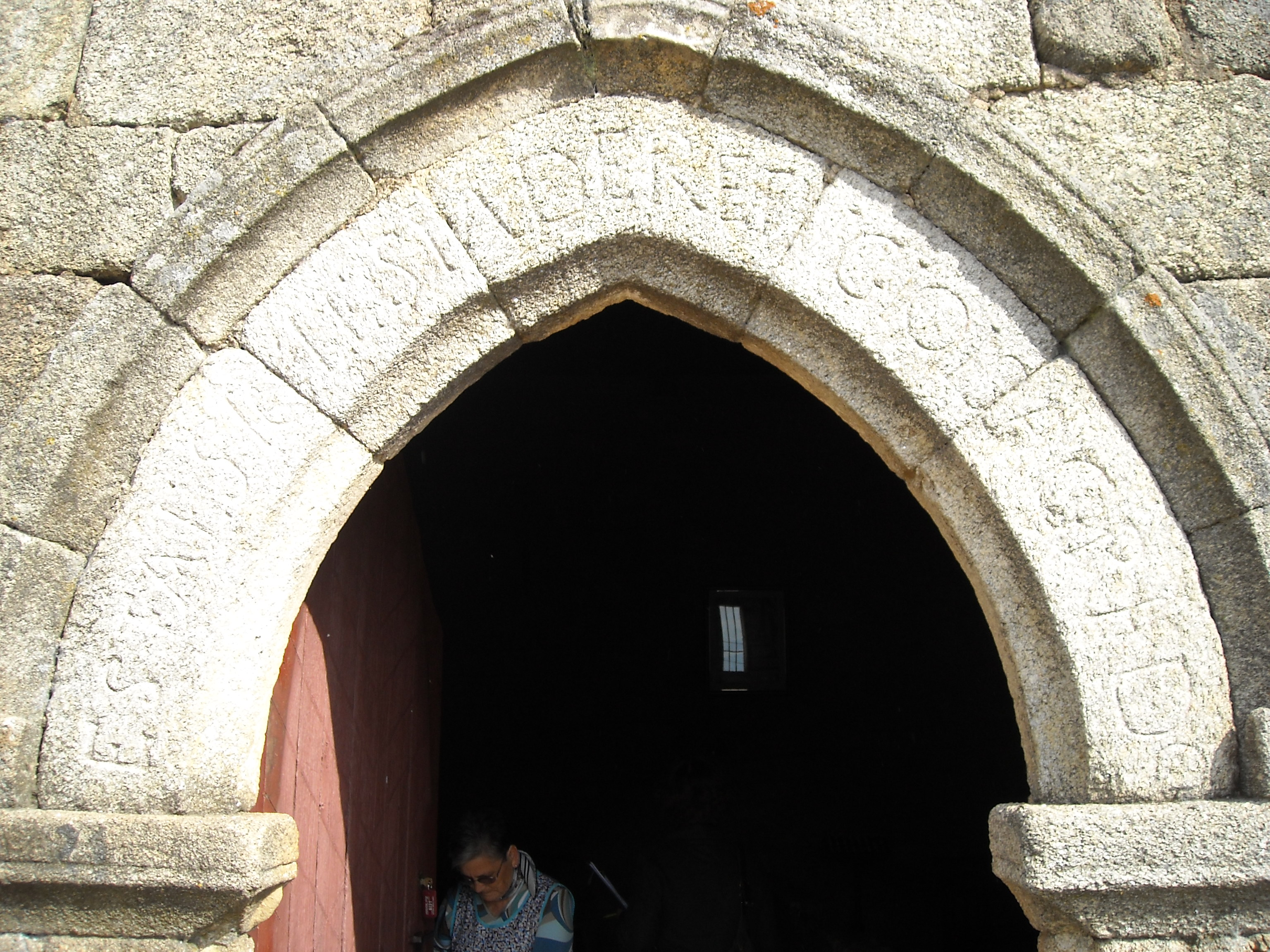 Mixós, parroquia de San Mamede de Estevesiños, concello de Monterrei, provincia de Ourense. Igrexa de Santa María de Mixós, entrada lateral.